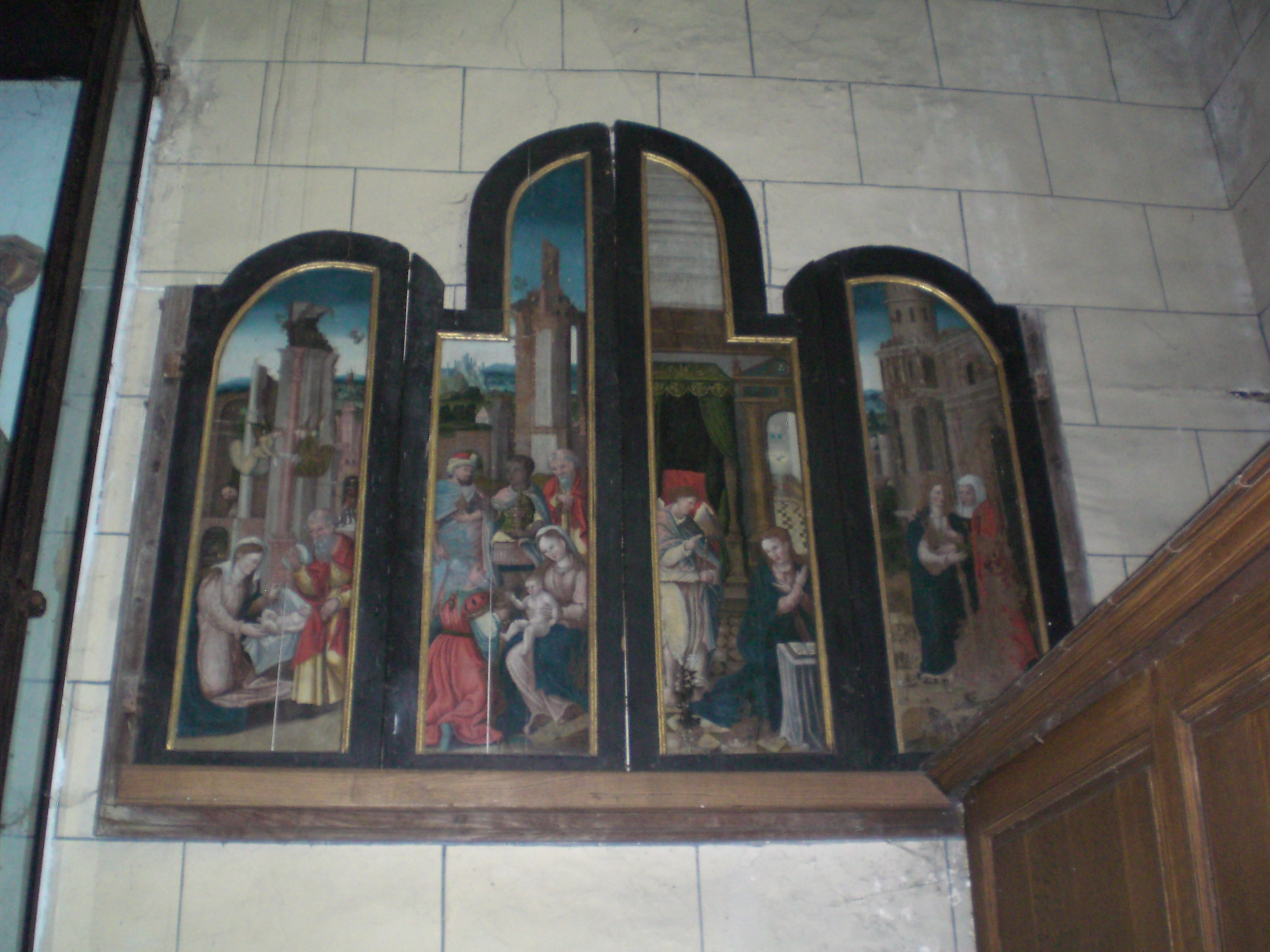 retable de la vie de date de 1544, classé depuis 1910, restauré en 1980.